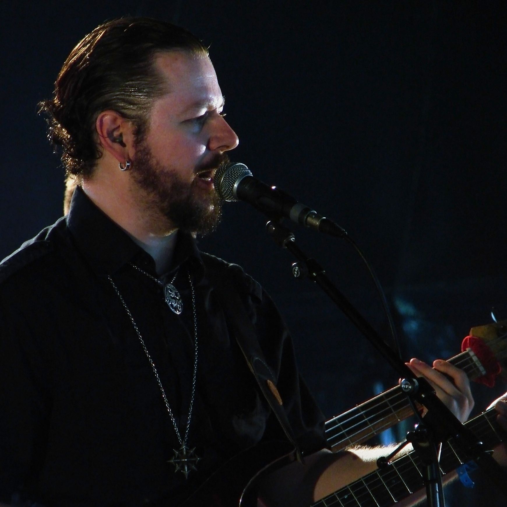 Ihsahn (Vegard Sverre Tveitan) au Hellfest 2010 à Clisson, le 18 Juin 2010.